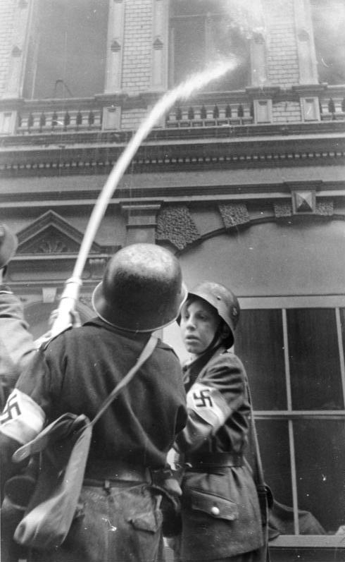 Prop.-Kp. Eins. mot., Bildberichter Genzler Ort: Düsseldorf Datum: 25.8.43 10 Minuten nach dem Terrorangriff. Einsatz des HJ-Schnellkommandos. Schon mehrere Stunden ununterbrochen sind diese Jungens mit den Löscharbeiten beschäftigt. So manches Haus konnte von ihnen den Flammen entrissen werden.